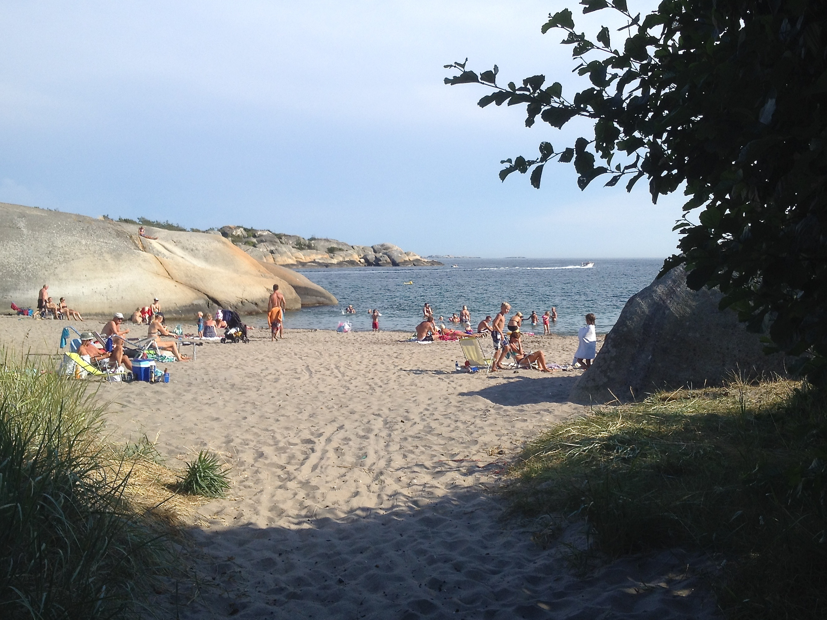 Beach, Ula